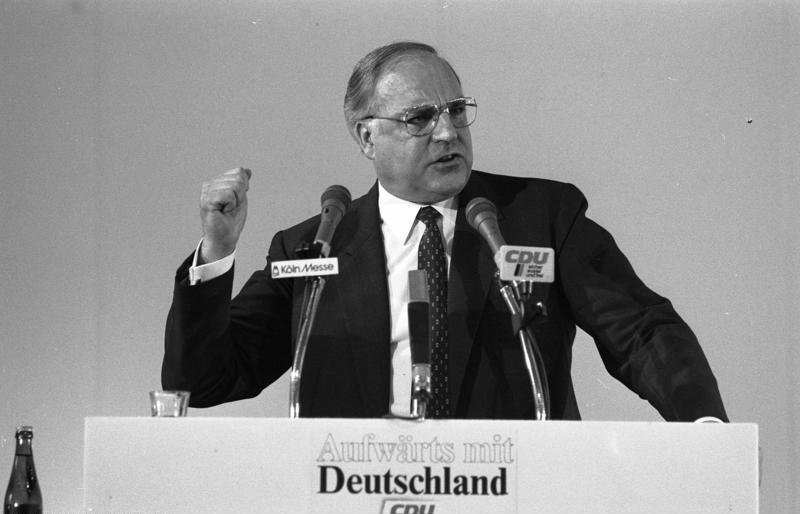 25.5.1983 31. Bundesparteitag der CDU in der Congress-Halle 8 der Kölner Messe.